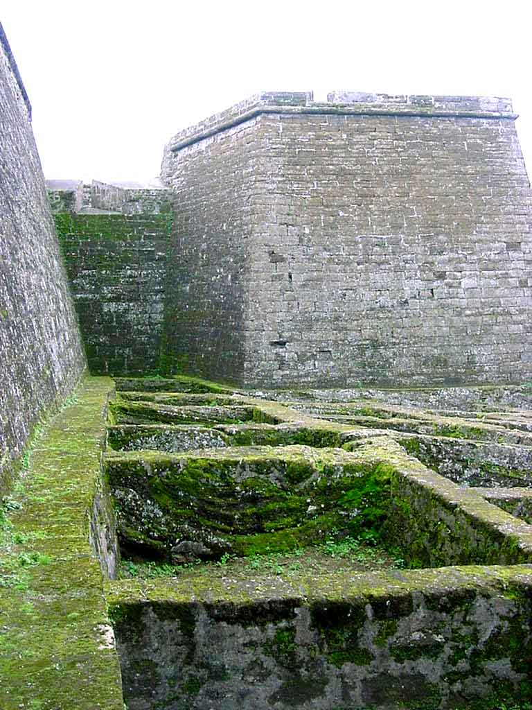 Fortaleza de São João Baptista do Monte Brasil, Angra do Heroísmo, ilha Terceira, Açores: aspecto das "covas de lobo".